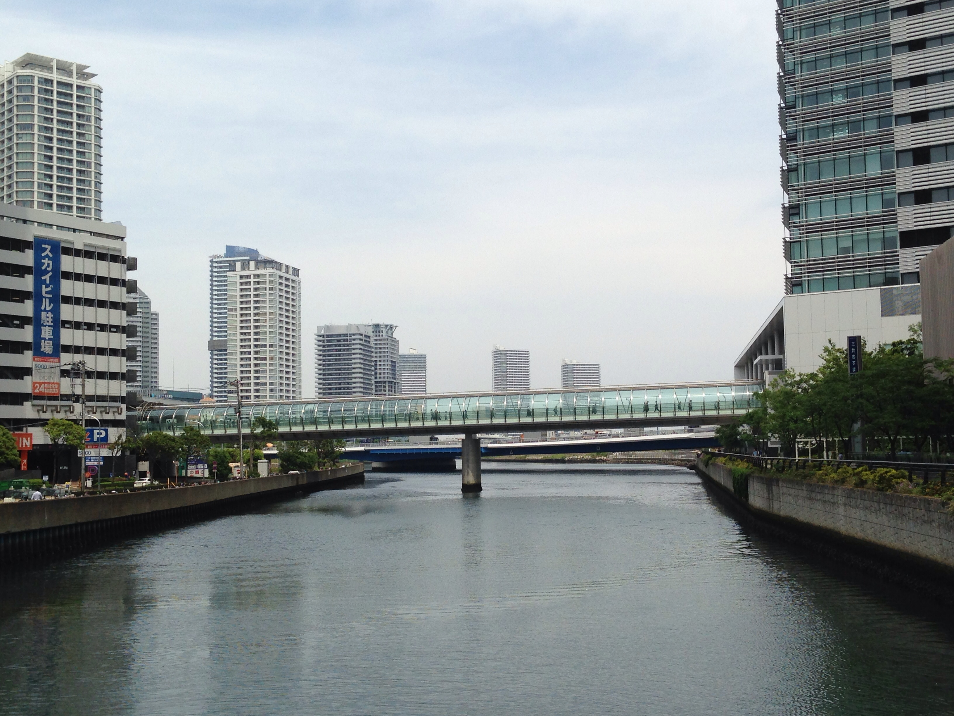 はまみらいウォーク南西面